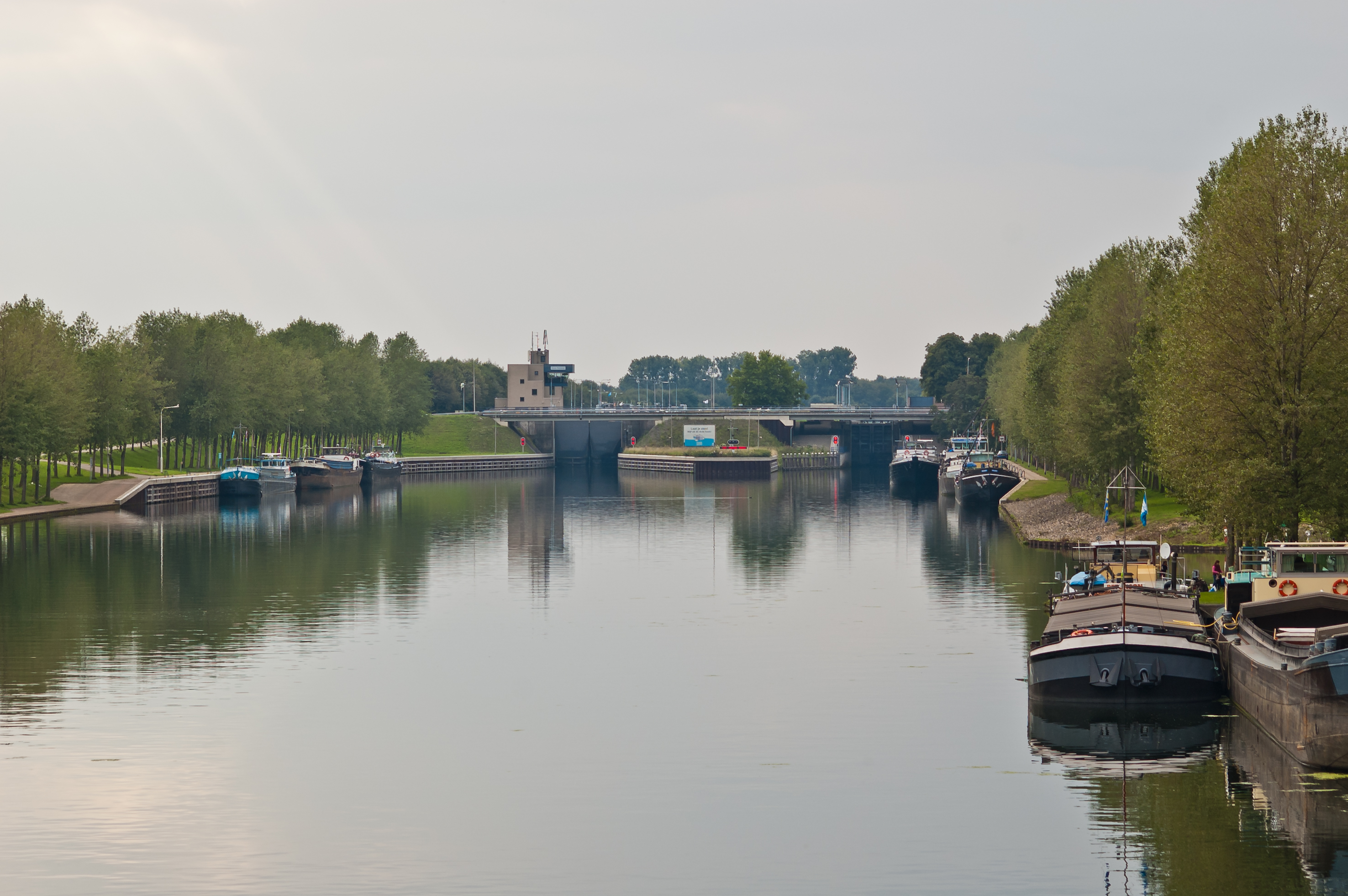 Schleuse Panheel, Kanal Wessem - Nederweert in den Niederlanden, mit östlichem (also maasseitigem) Vorhafen